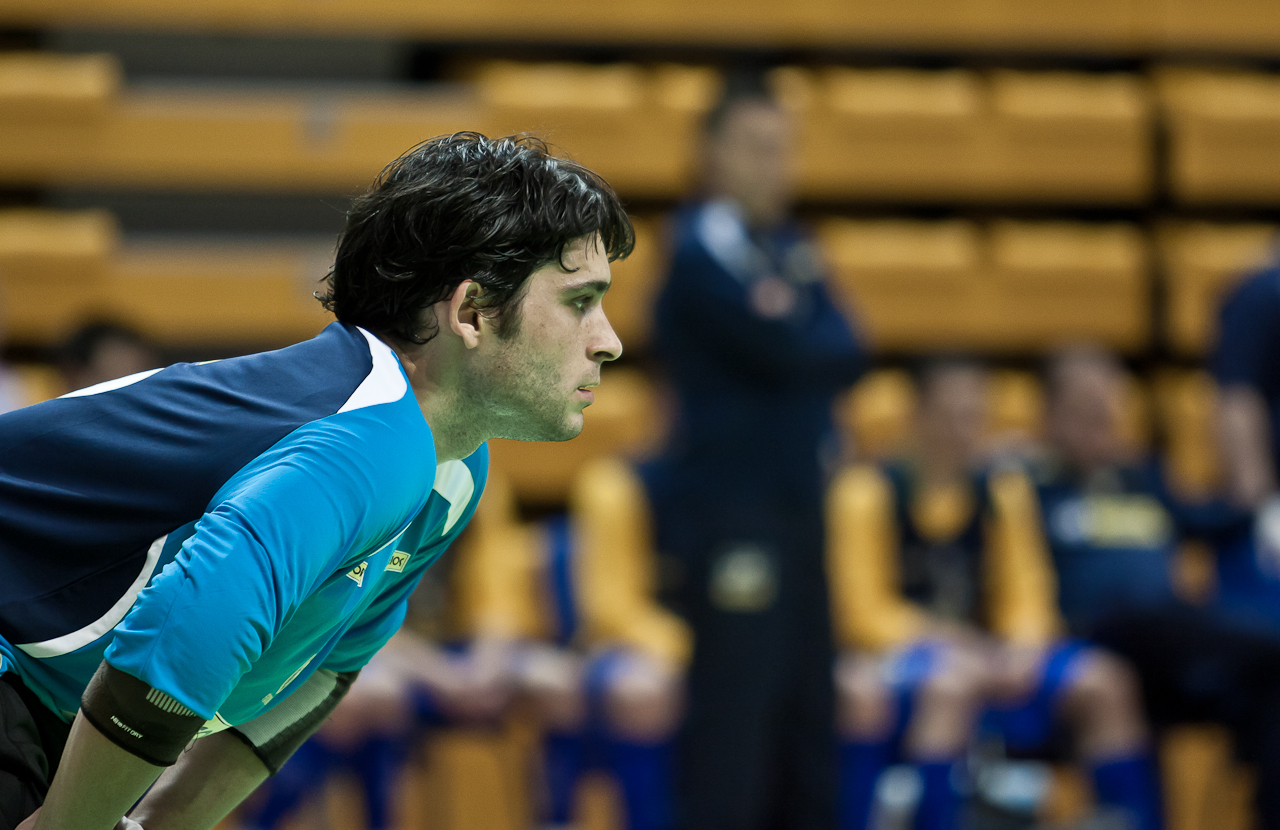 Тиаго